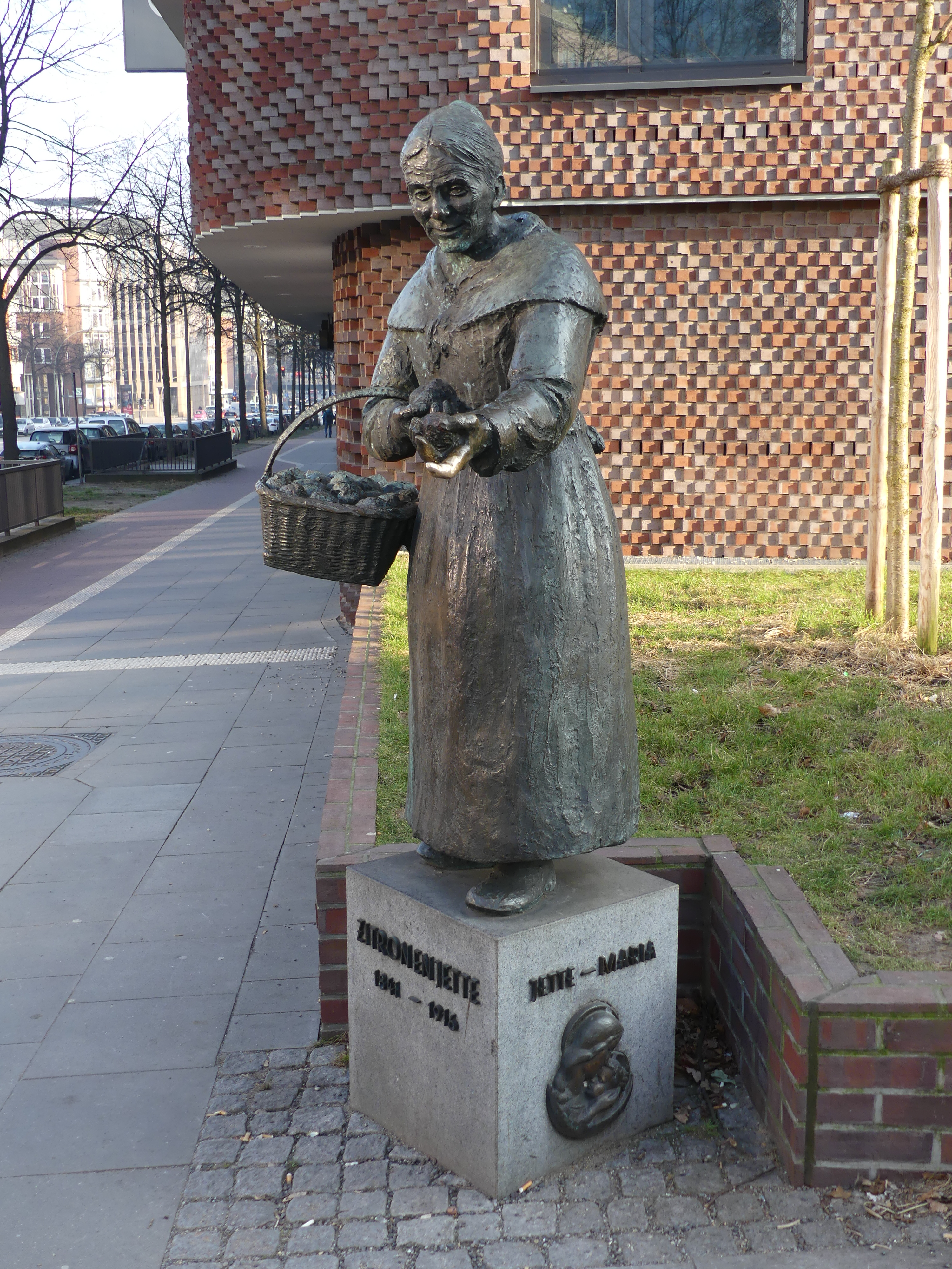 Das Bild zeigt die Statue der Zitronenjette von Hansjörg Wagner. Die Statue stellt die Zitronenjette mit einem Korb voller Zitronen dar.